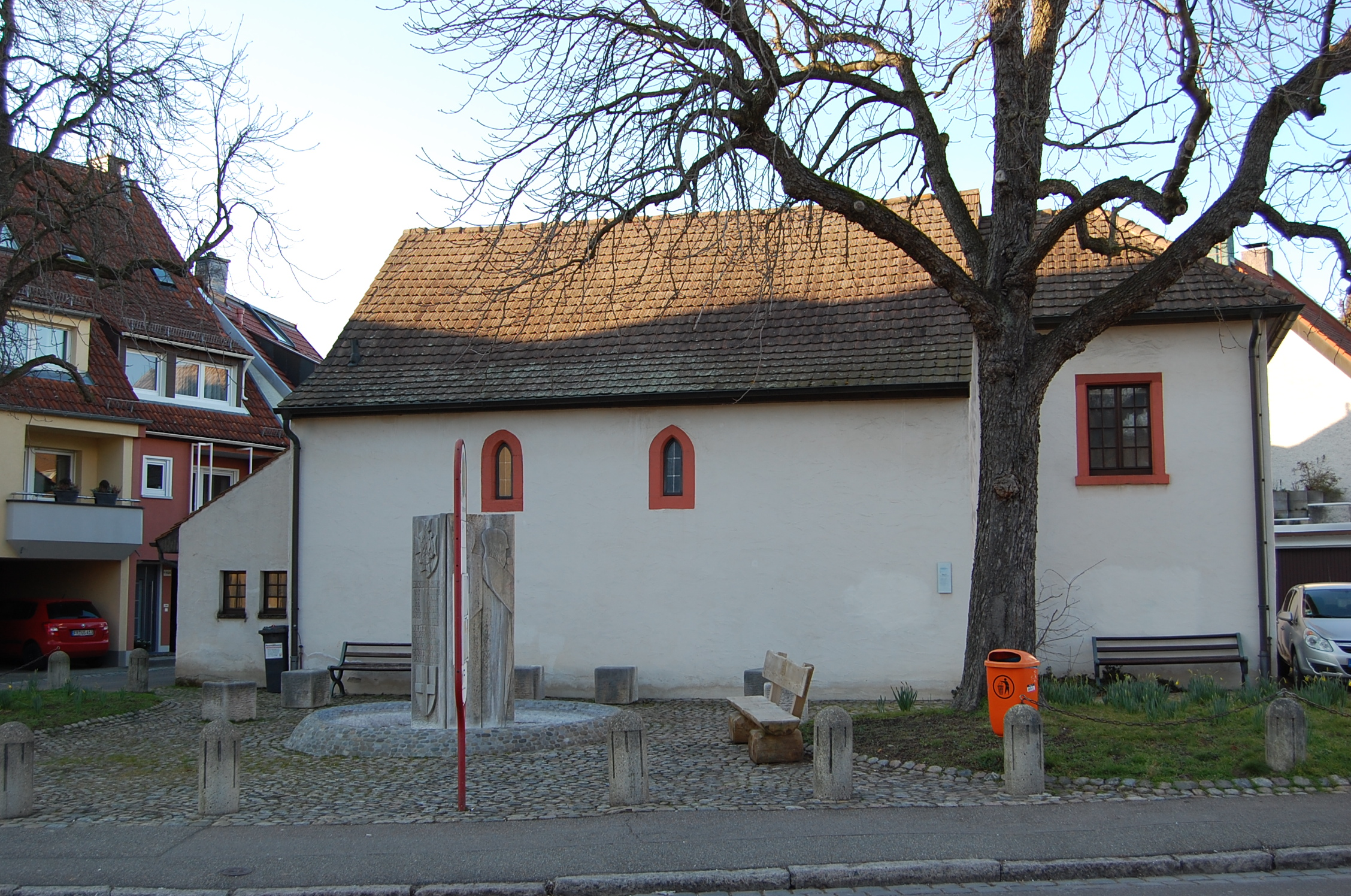 Kapelle Peter und Paul in St. Georgen (Freiburg), gesehen von der Andreas-Hofer-Straße